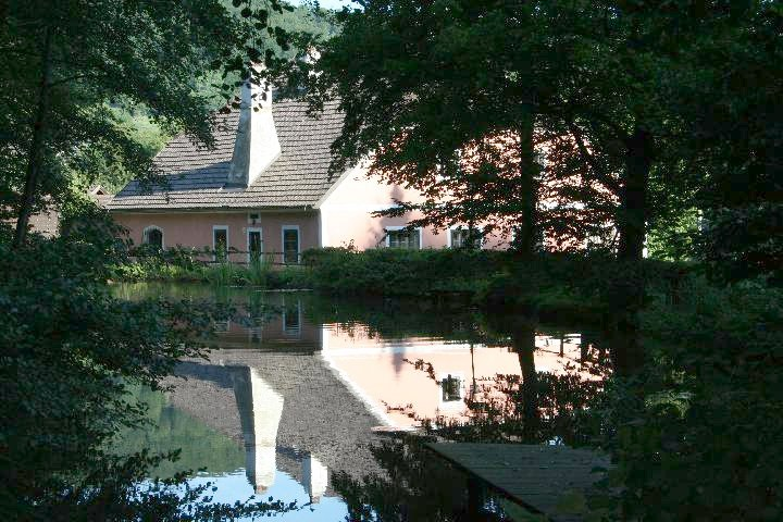 Hammerschmiede Pehn in Aggsbach Dorf (Austria)